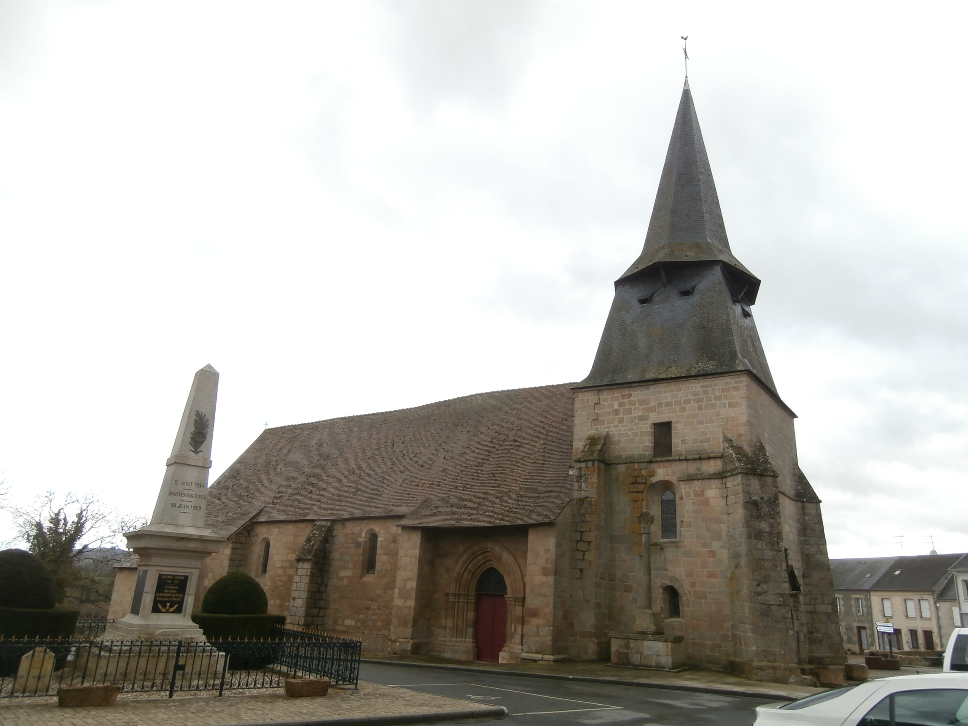 Eglise Saint Symphorien (Bussière-Dunoise)